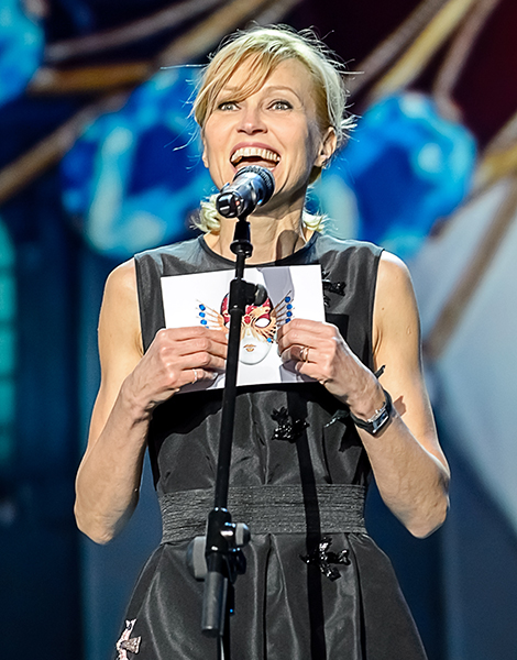 Фестиваль «Золотая маска» 2015 года